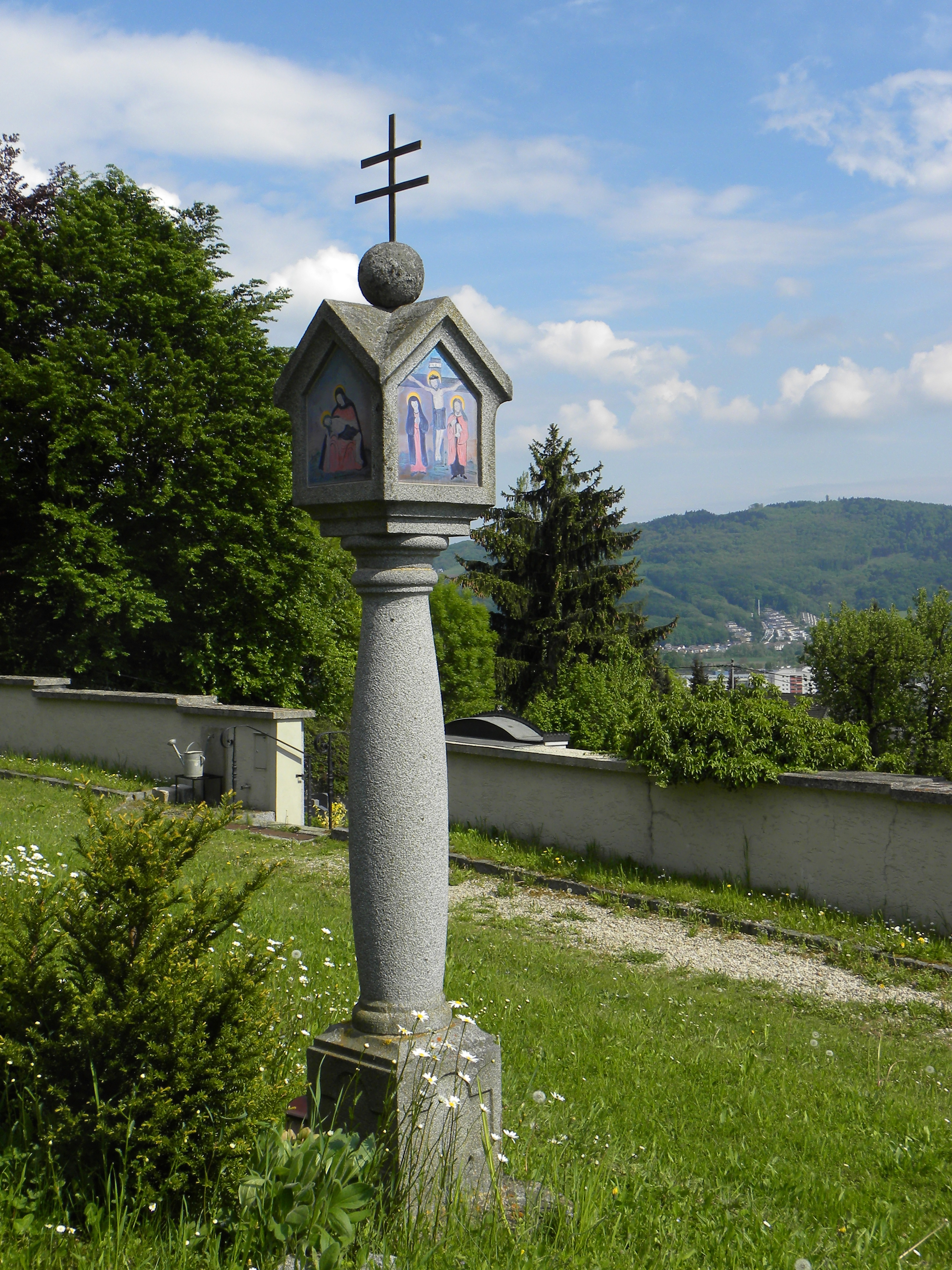 Marterl Friedhof St. Magdalena